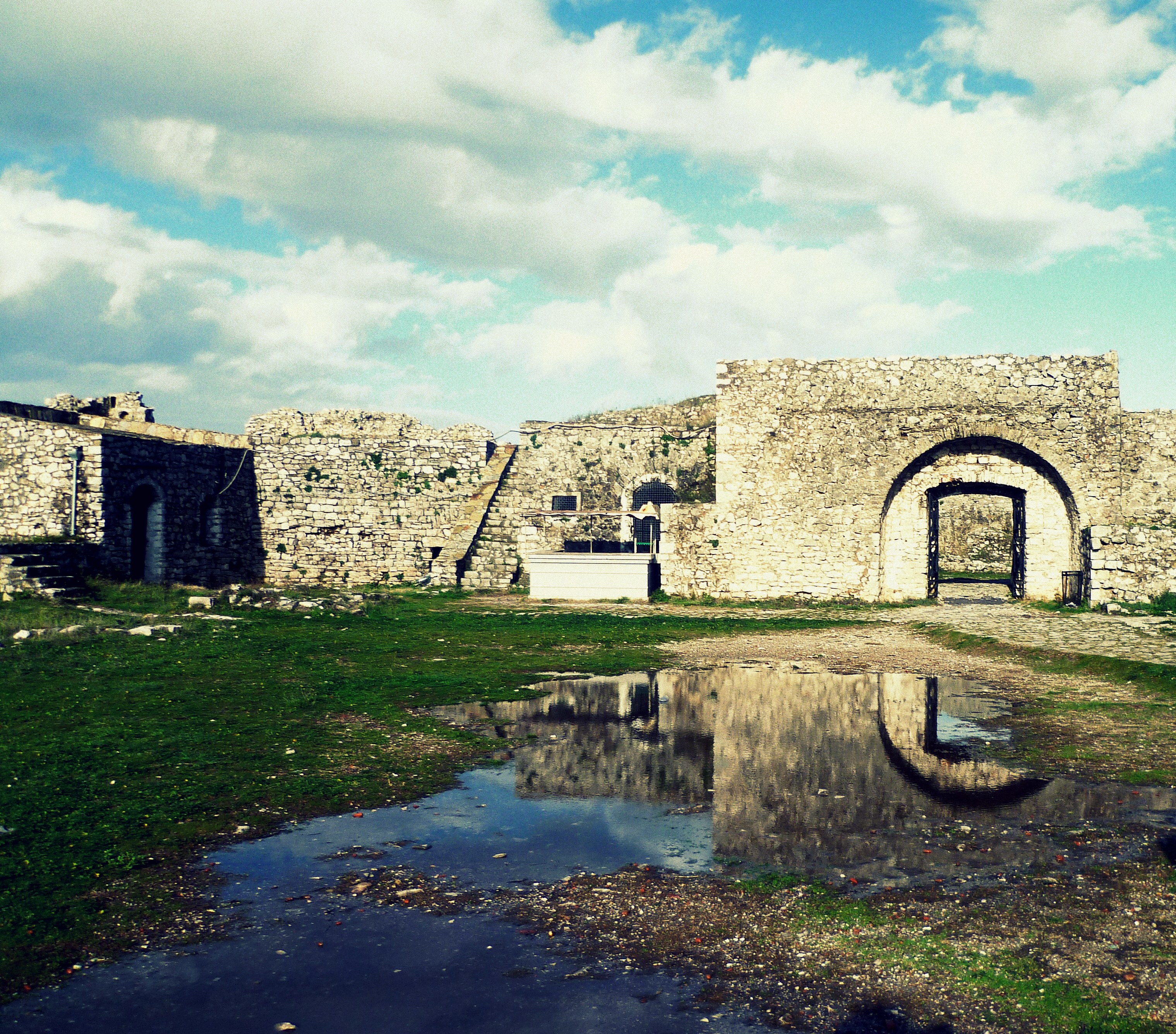 Kalaja e Rozafes, Shkoder 2